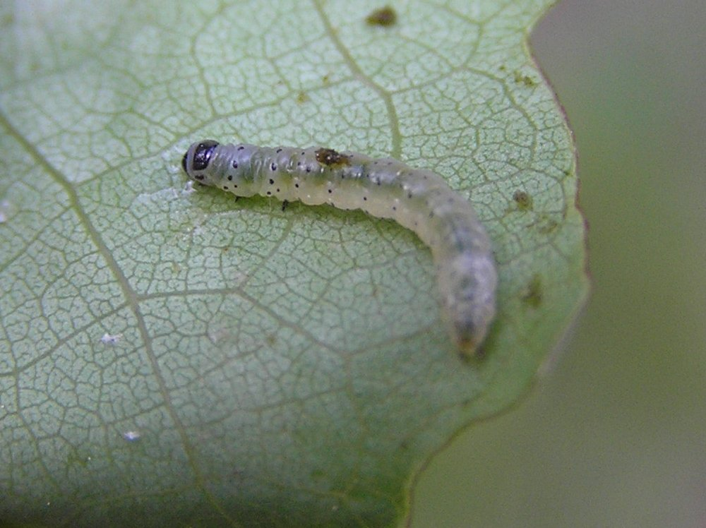 Anacampsis populella, Polska